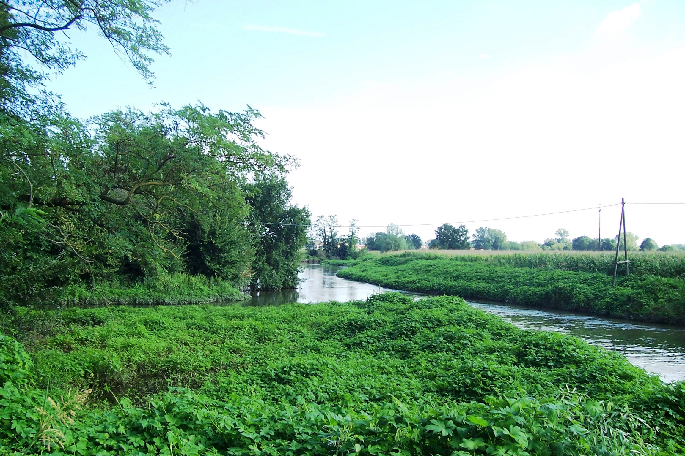 L'Olonetta confluisce nel Roggione (a destra), dando origine al fiume Olona Inferiore. Località Settimo, fraz. di Bornasco